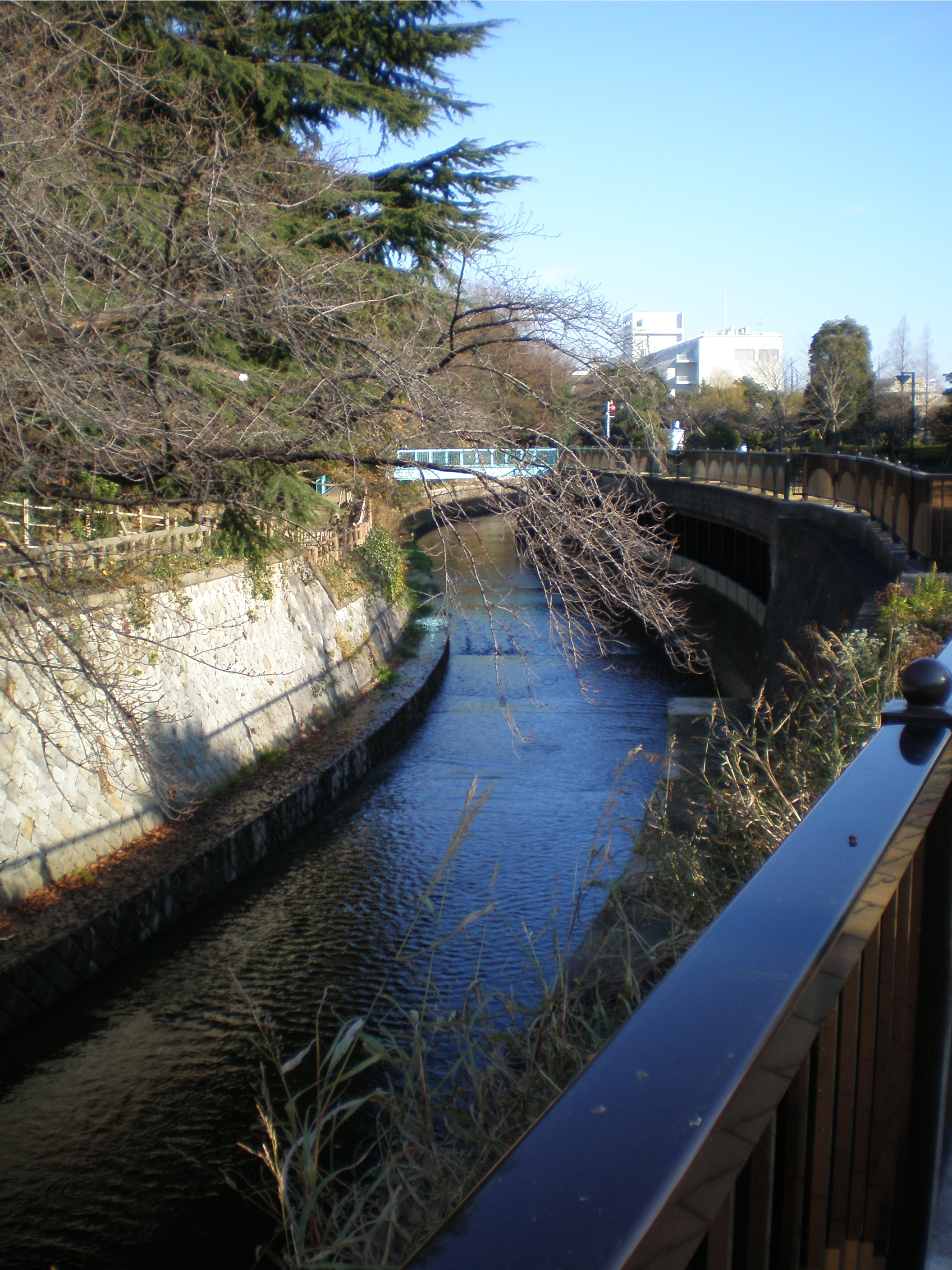 哲学堂公園〔写真左手〕の脇を流れる妙正寺川。中野区松が丘1丁目。右手は妙正寺川公園。下流（東）の方向を見る。地図はこちら。